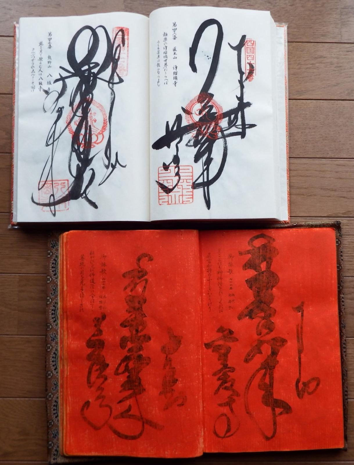 四国八十八箇所の納経帳